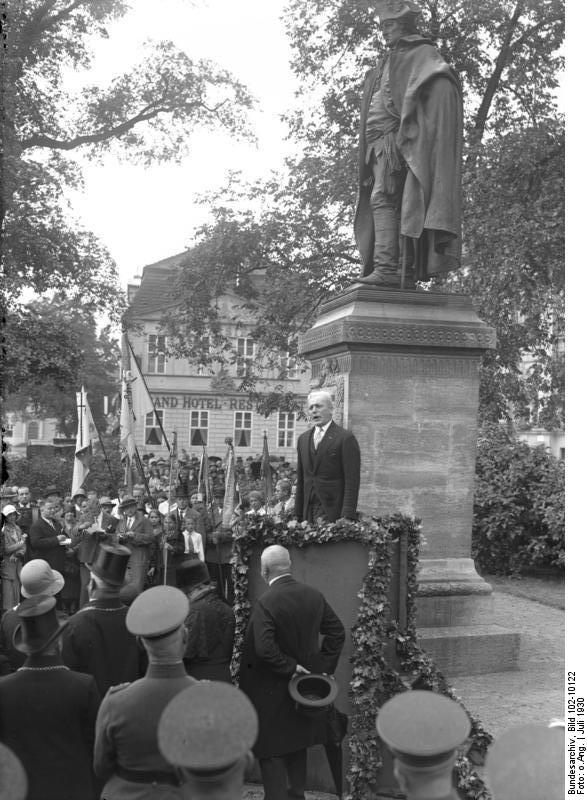 Zur 200. Wiederkehr des Geburtstages des deutsch-amerikanischen Generals Friedrich Wilhelm von Steuben fand an dem Steubendenkmal in Potsdam, dem einzigen Steuben-Denkmal in Deutschland, eine grosse Kundgebung der deutsch-amerikanischen Steubengesellschaft statt. Tausende wohnten dieser erhebenden Feier bei. - Blick auf die Feier am Fusse des Steuben-Denkmals im Lustgarten in Potsdam während der Ansprache des Präsidenten der deutsch-amerikanischen Steuben-Gesellschaft, Hoffmann. Albert Jaegers (1868–1925) DescriptionAmerican sculptorDate of birth/death 28 March 1868 22 July 1925Location of birth/death Elberfeld SuffernAuthority control : Q4710560 VIAF: 1073151535358502890006 GND: 114971073X creator QS:P170,Q4710560